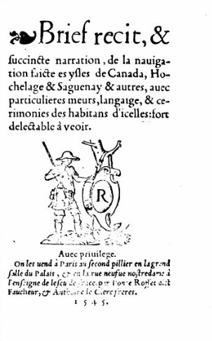 Jacques Cartier, Breif recit, 1545. Title page